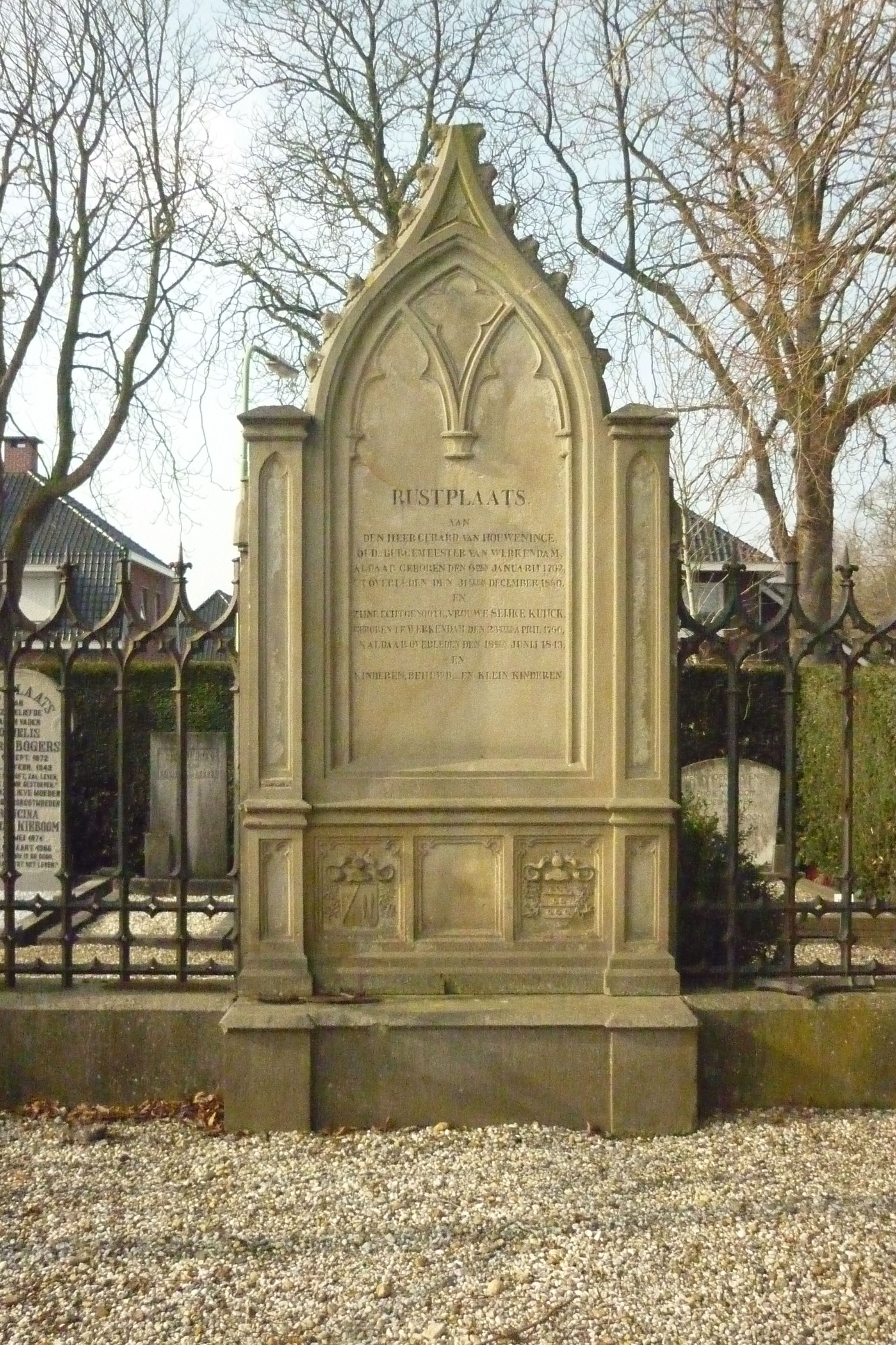 Grafmonument op het Kerkhof bij het Laantje in Werkendam van Gerard van Houweninge